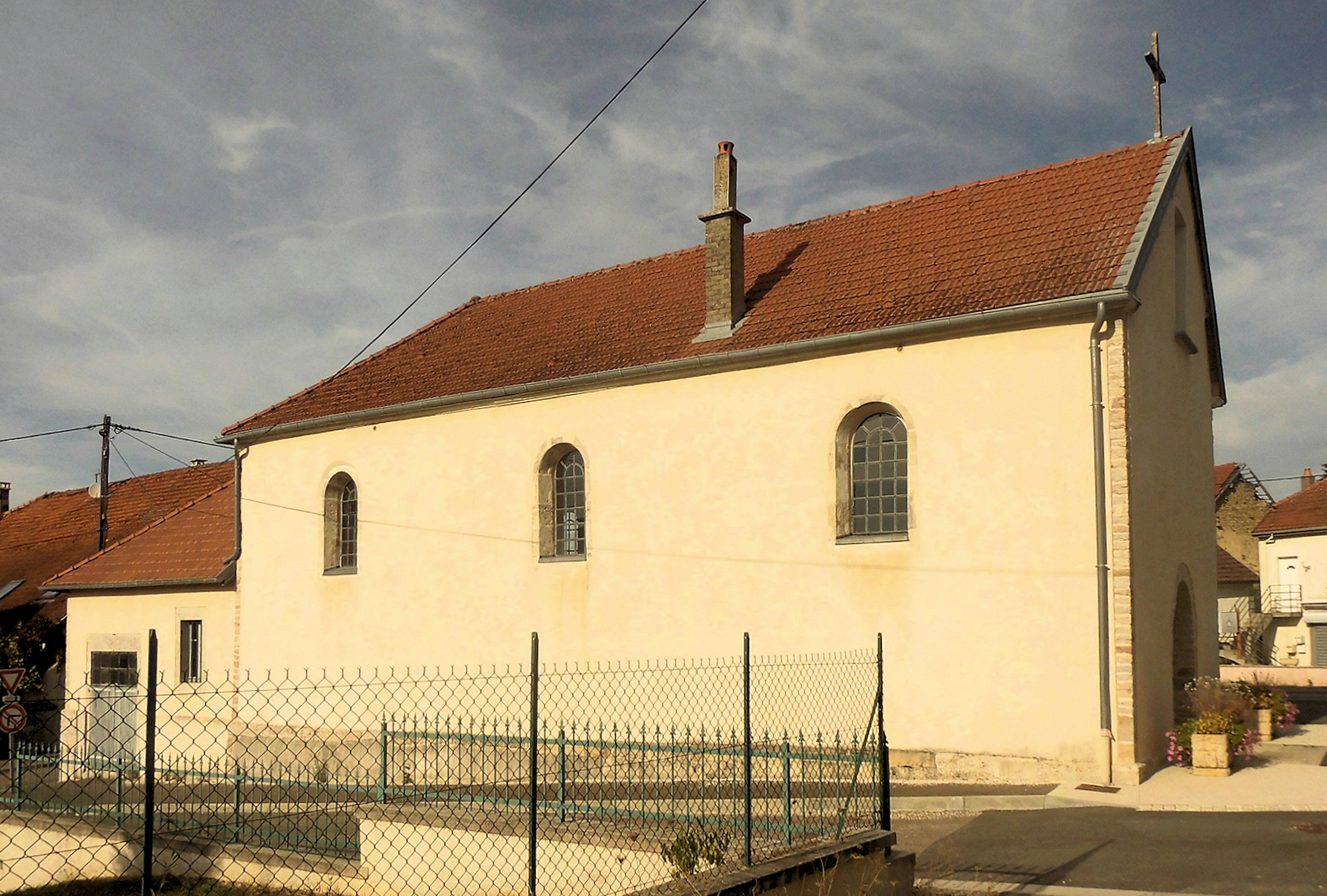 L'église Saint-Maurice de Charmoille